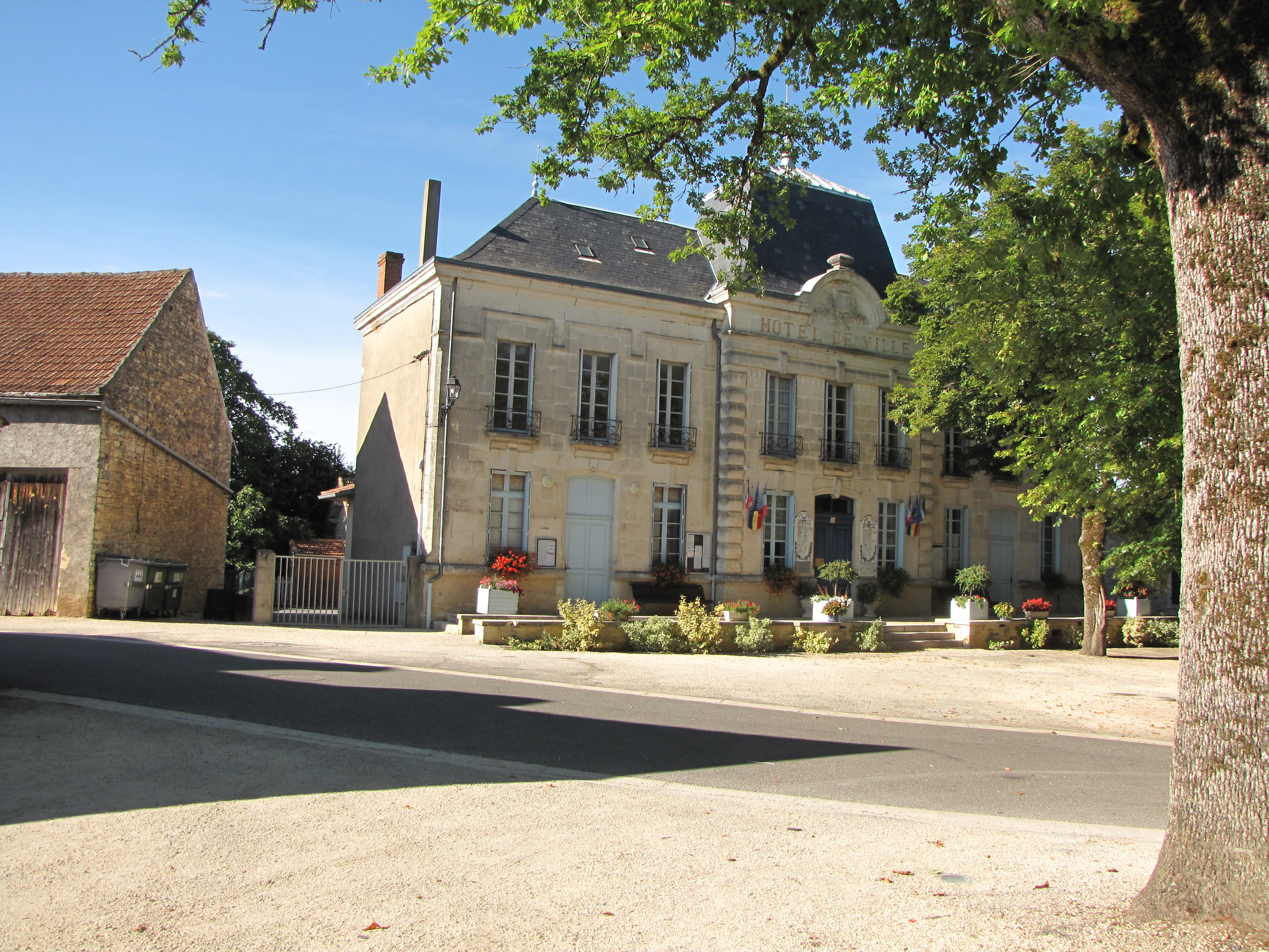 Mairie de Thédirac